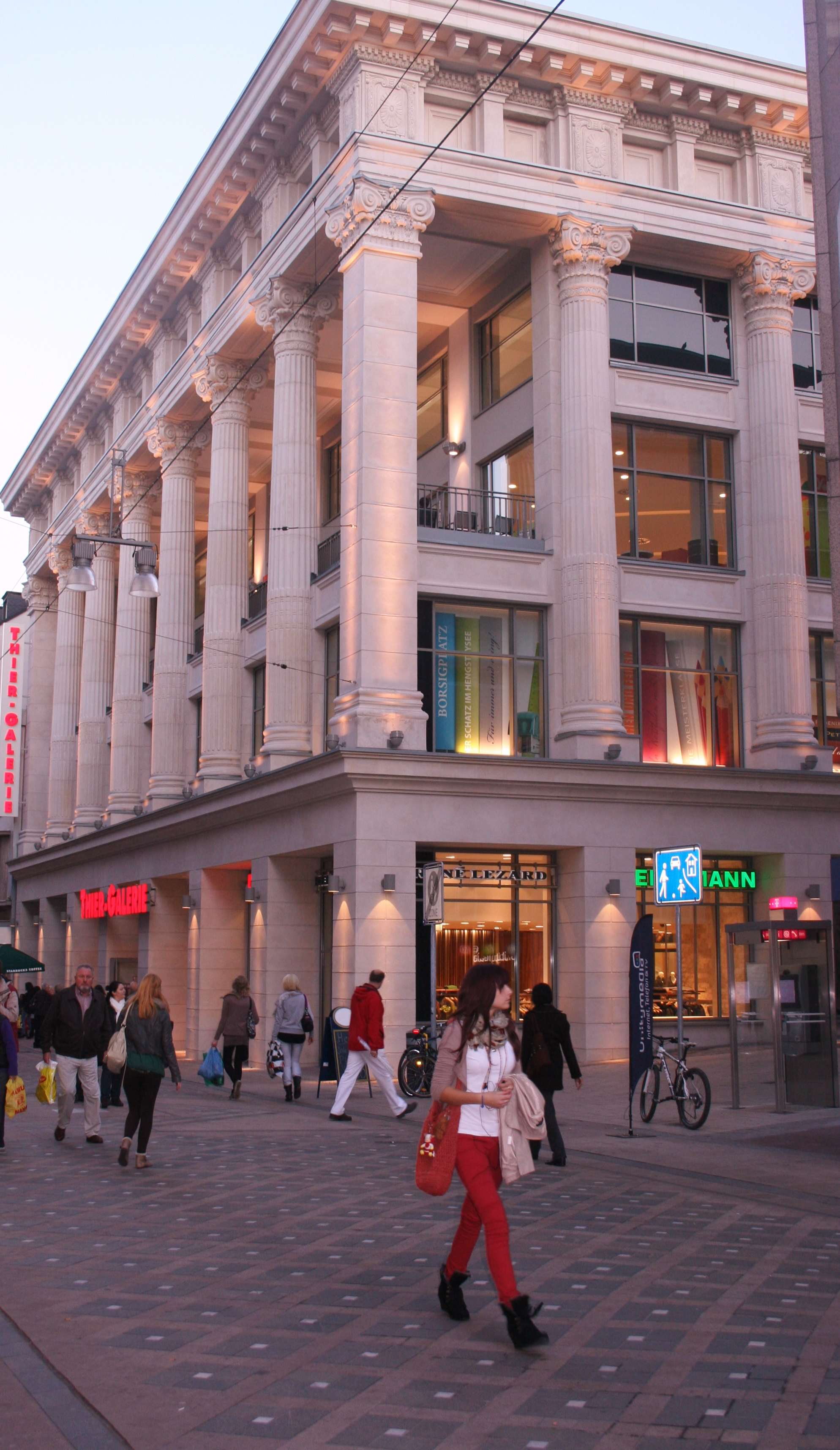 Historisches entree zum Einkaufszentrum Thier-Galerie